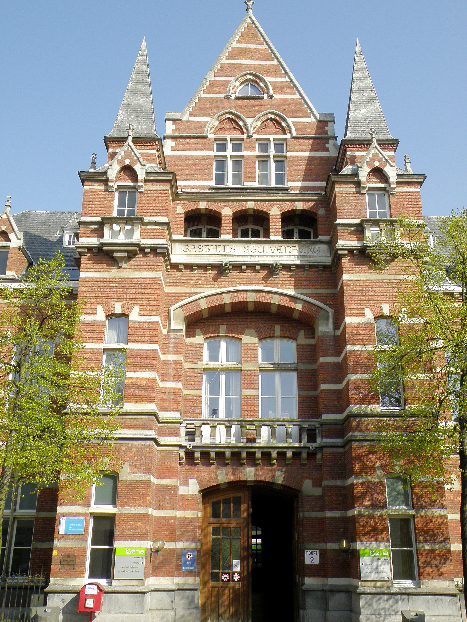 Ingangsgebouw Stuivenbergziekenhuis te Antwerpen, arch. Jules Bilmeyer en Jozef Van Riel. Oorspronkel. ontwerp van Frans Baeckelmans.